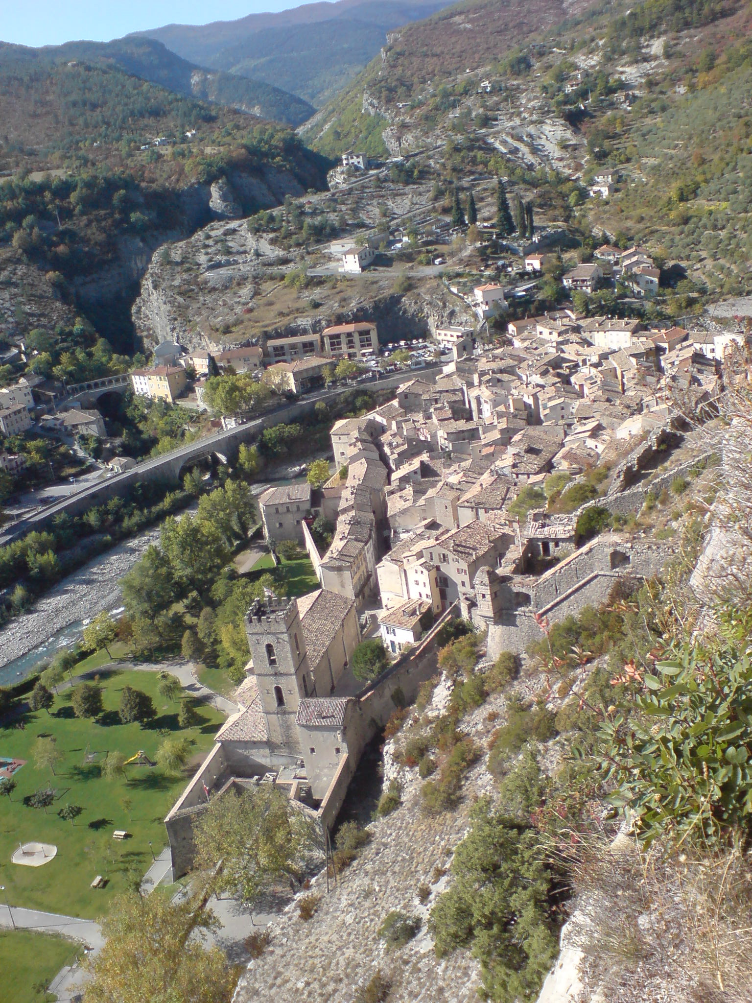 Vue générale d'Entrevaux, du chemin fortifié qui monte à la citadelle. On voit à droite l'échauguette d'un fort de ce chemin ; l'ouvrage à cornes qui défend la porte d'Italie, surmonté du clocher crénelé de la cathédrale d'Entrevaux ; la vieille ville ; le Var (fleuve) ; le débouché des gorges de la Chalvagne avec un pont surmonté d'un petit aqueduc.